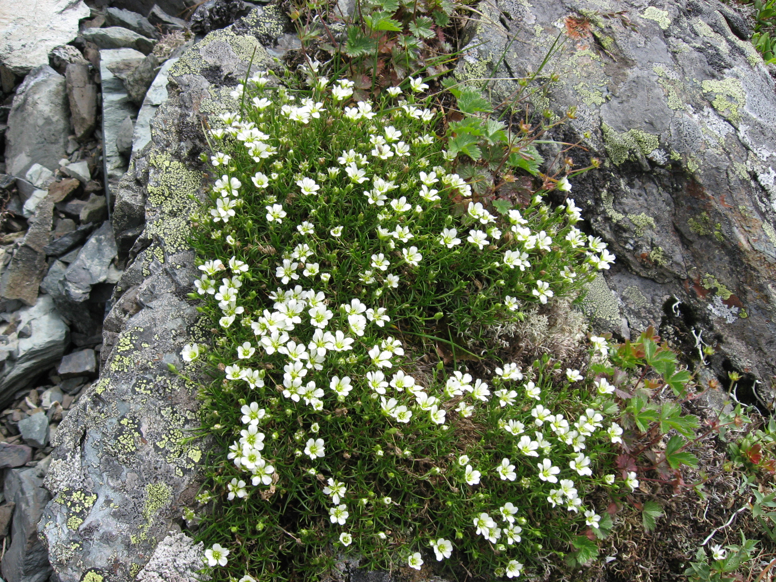 タカネツメクサ